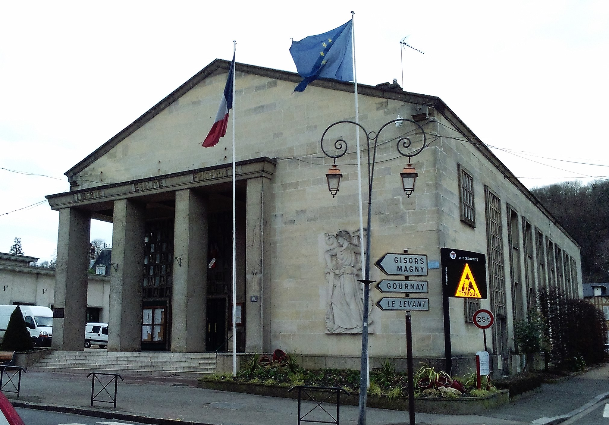 LES ANDELYS MAIRIE